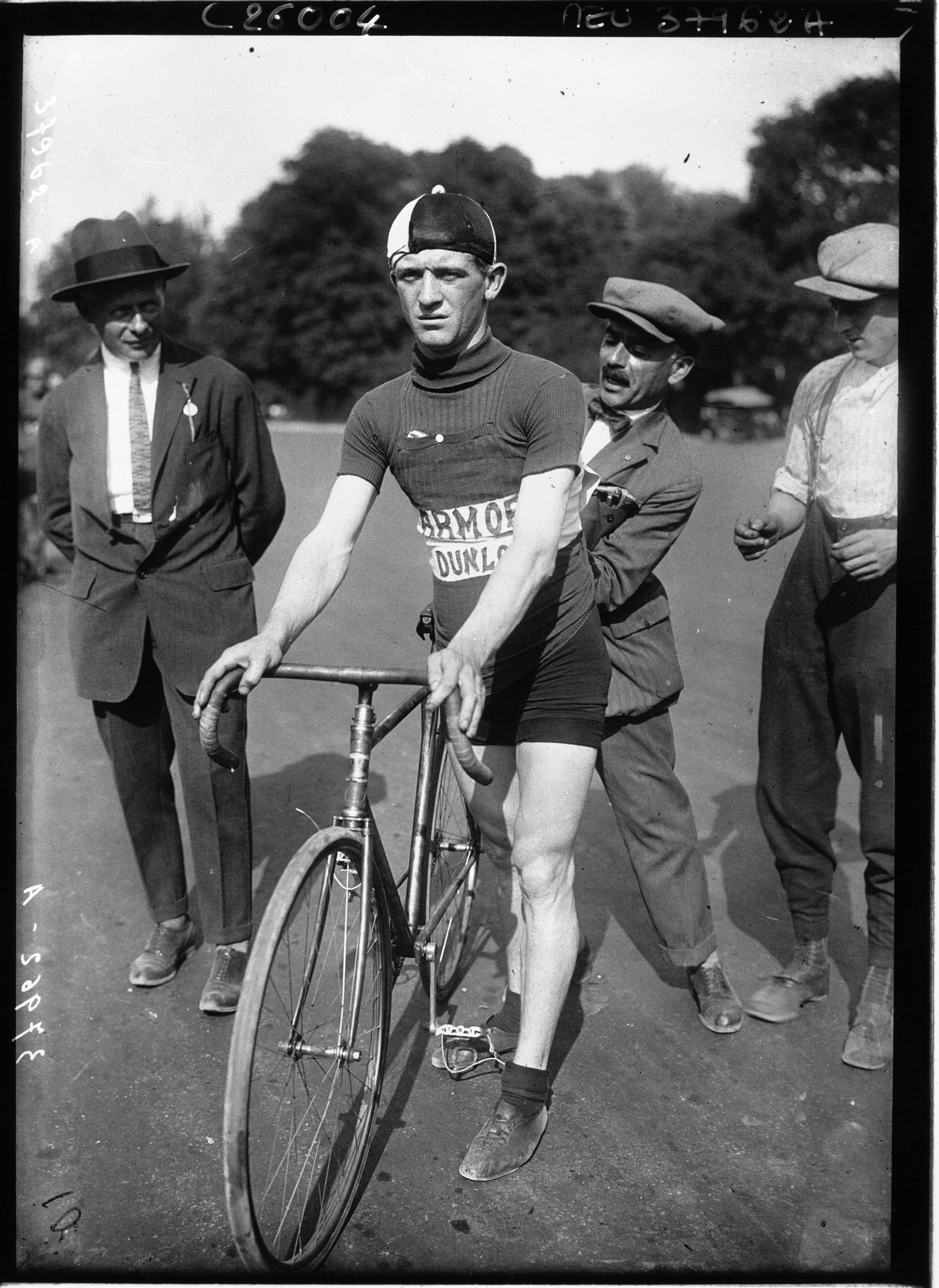 Critérium des As de 1926 : Julien Delbecque .